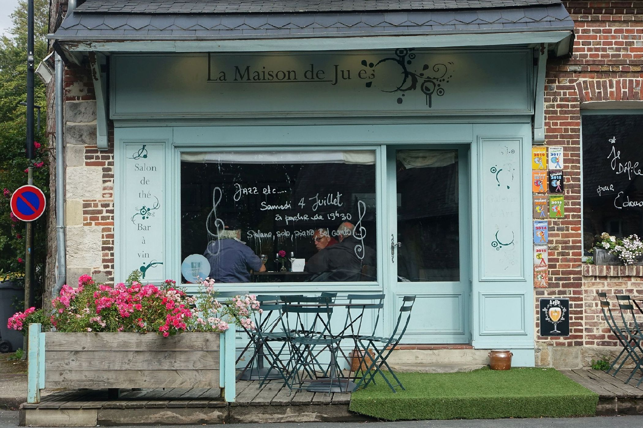 Bistro in Varengeville-sur-Mer